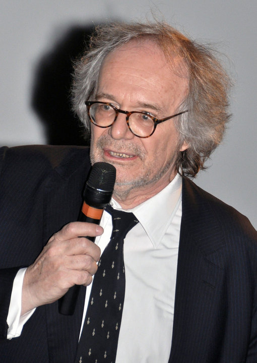 Pascal Thomas à l'avant-première du film Ensemble nous allons vivre une très très grande histoire d'amour